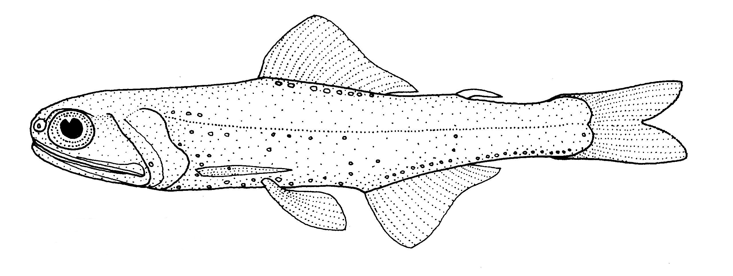 Gymnoscopelus piabilis (no common name)